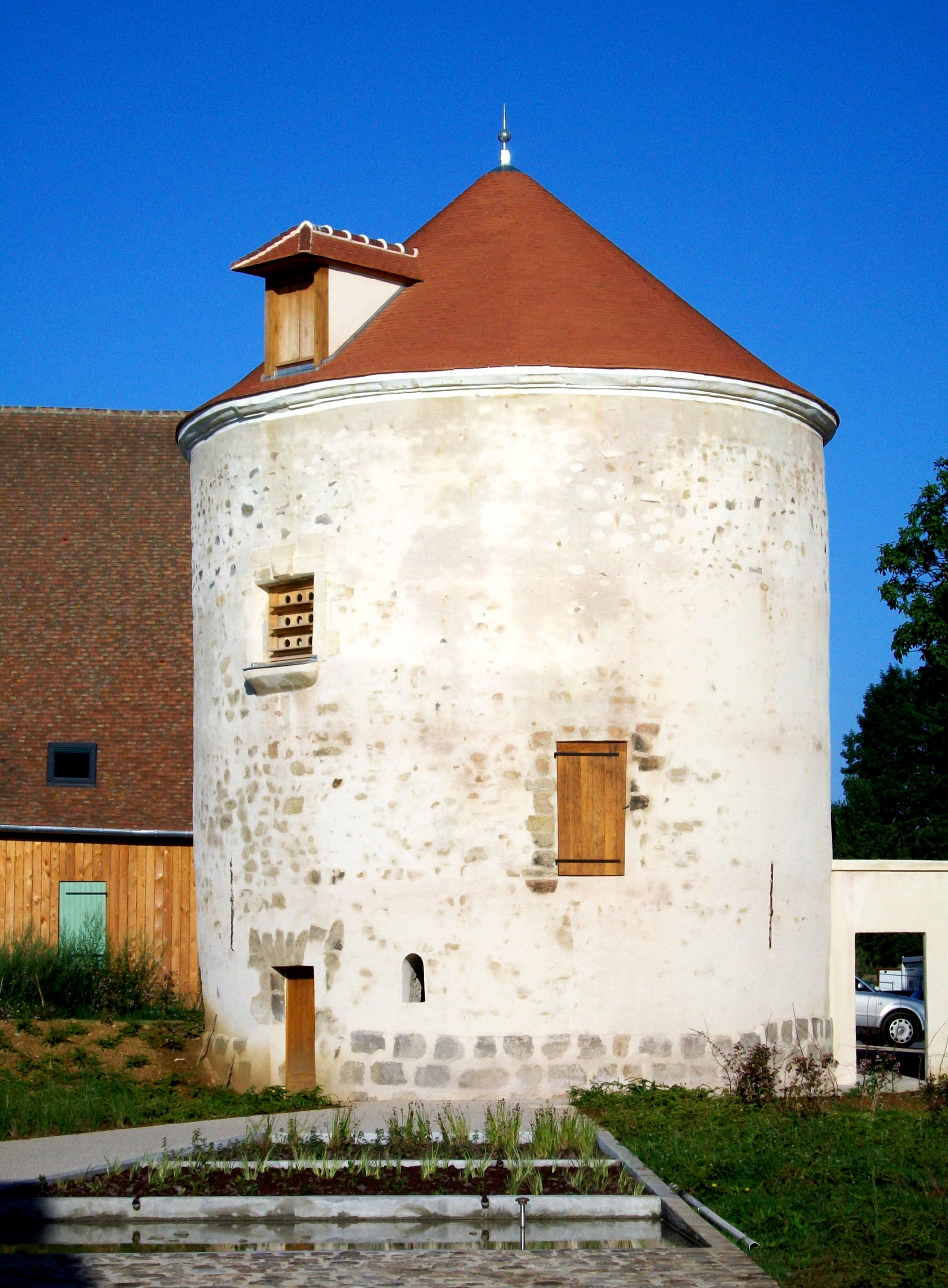 Le colombier de l'ancienne grande ferme de Survilliers (95) après rénovation.